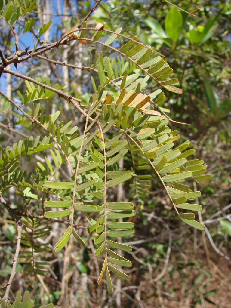 Machaerium hirtum - FABACEAE - Parque Nacional de Brasília - Distrito Federal - Brasil.